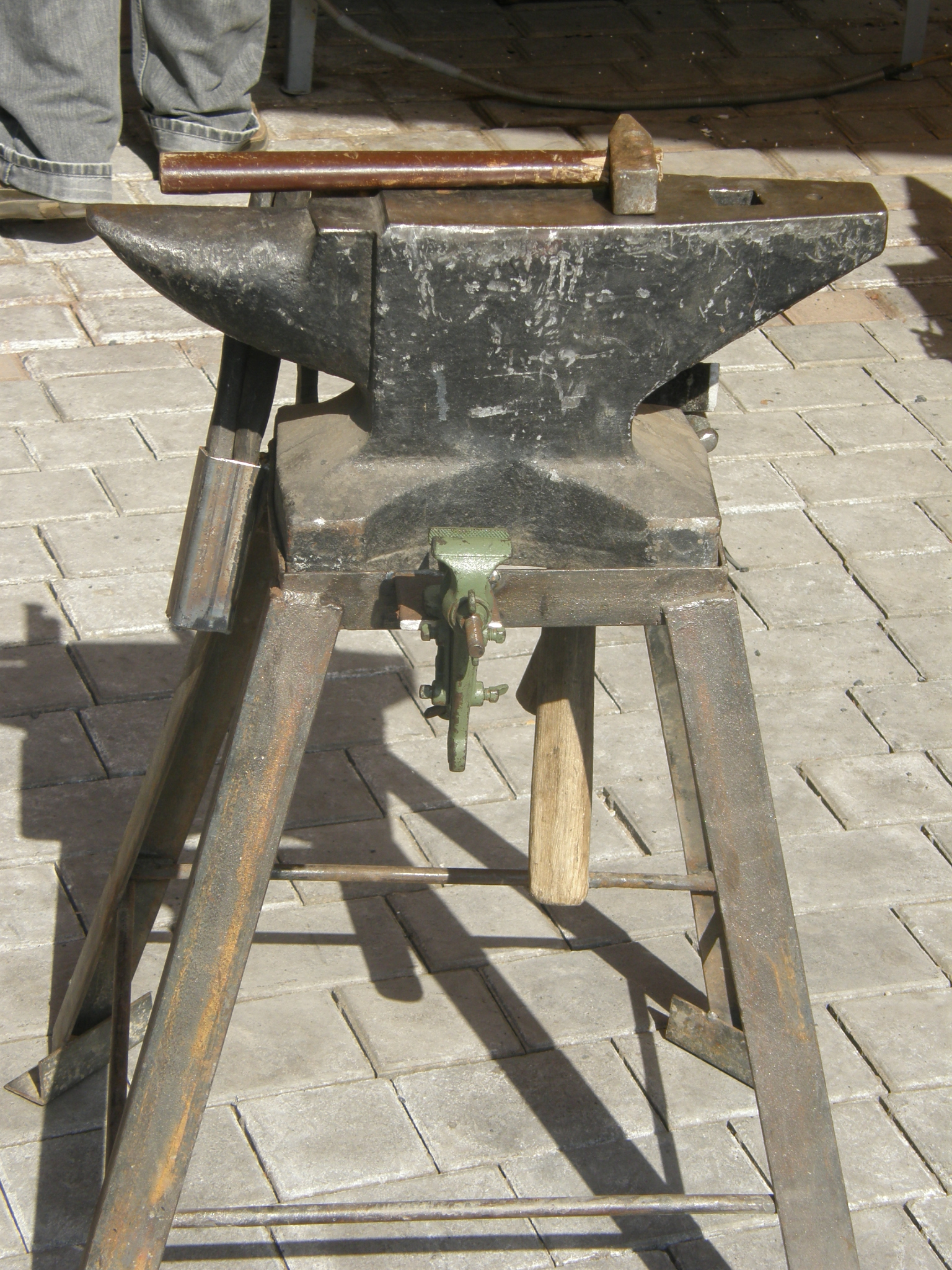 12 международный кузнечный фестиваль в Донецке